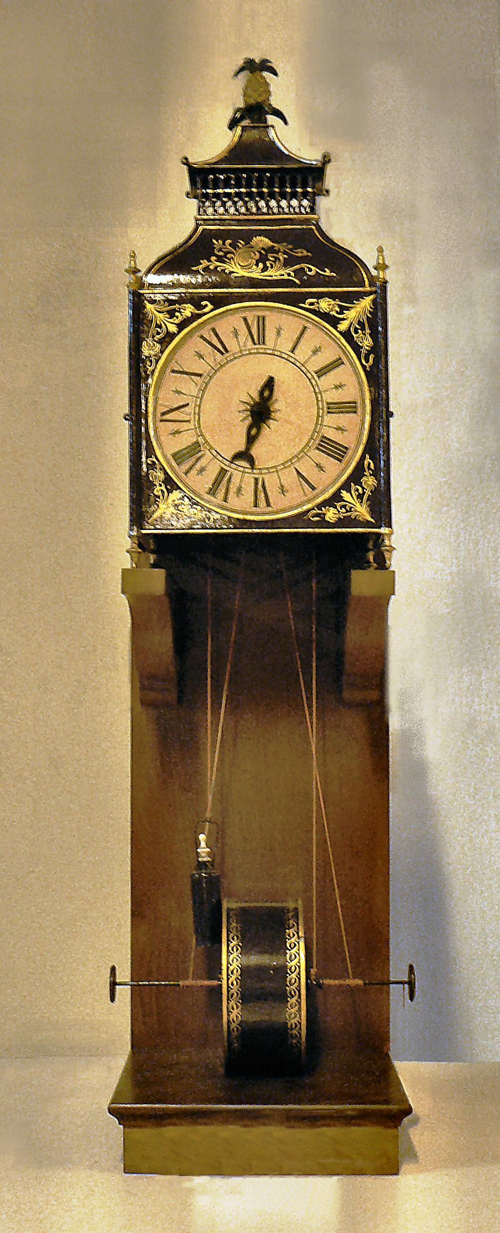 Horloge à eau attribuée aux frères Regnard, horlogers à Sens. Le cadran peut être rétro-éclairé. Localisation : réserves du Musée des Arts et Métiers, Paris.